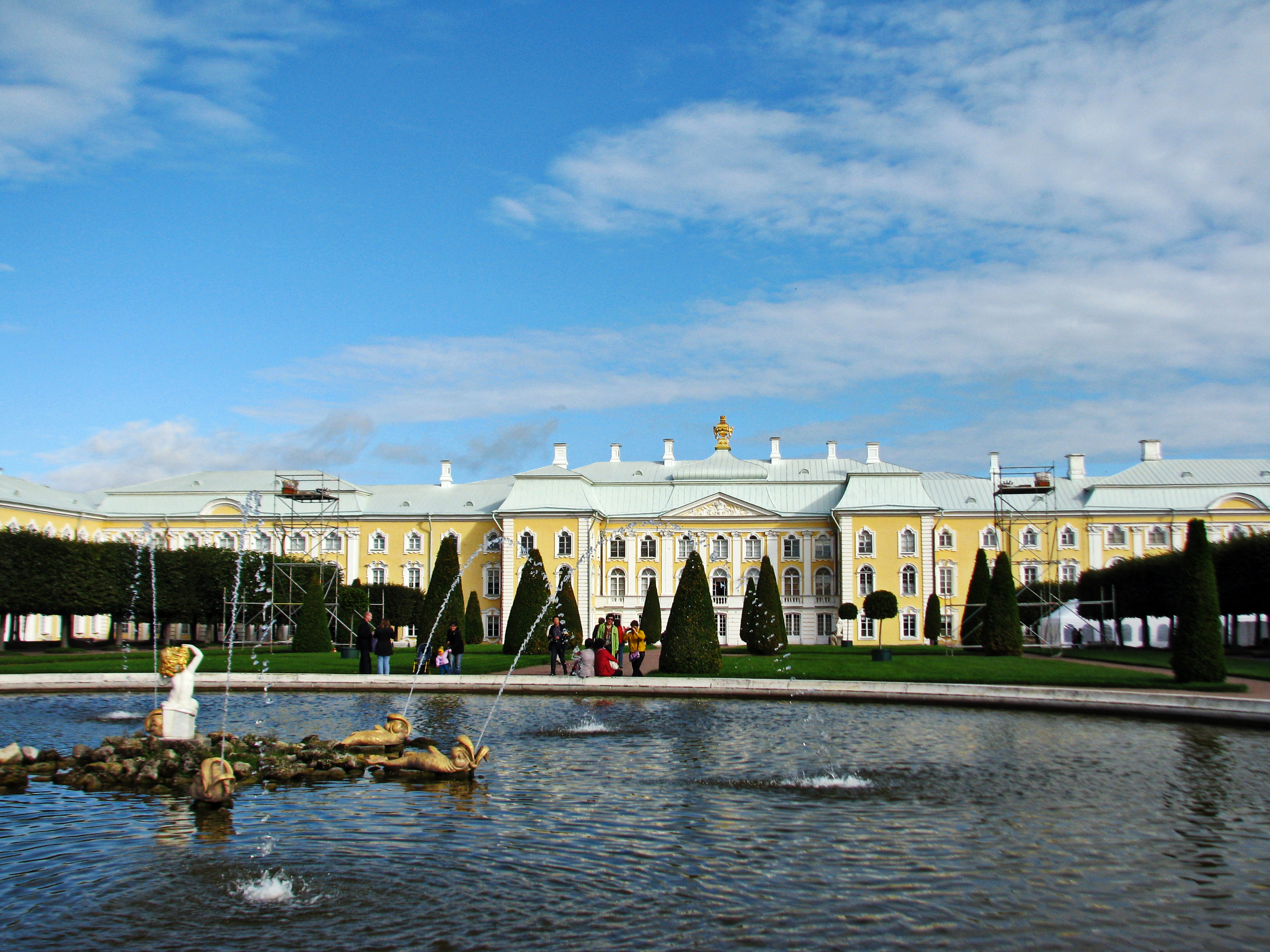 Большой дворец